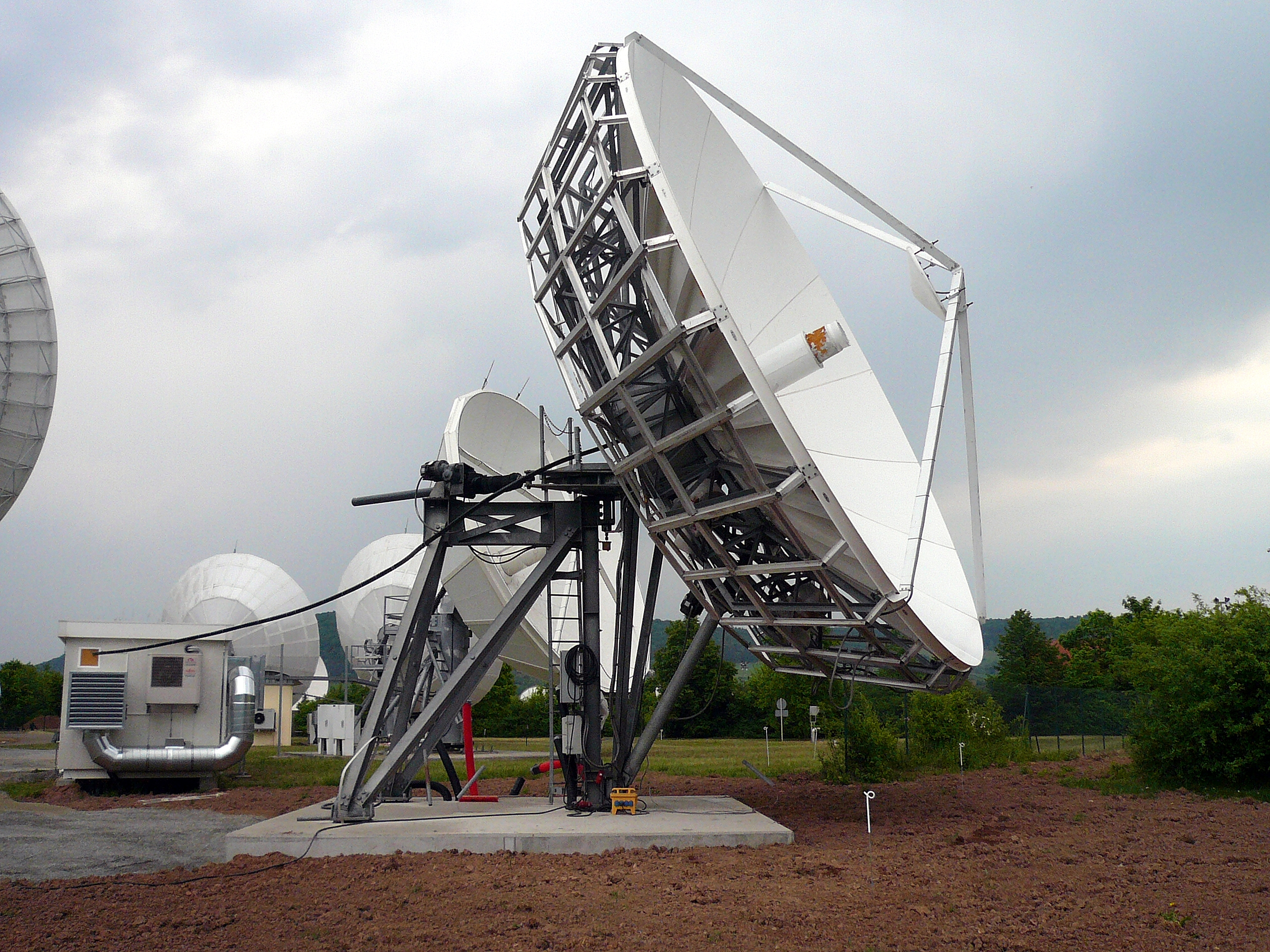 Satellite ground station Fuchsstadt, Deutschland, aerialfield one